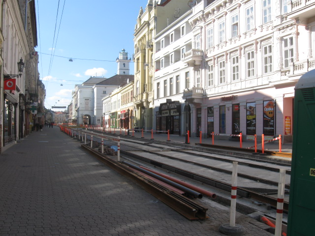 A miskolci villamos pályarekonstrukciója